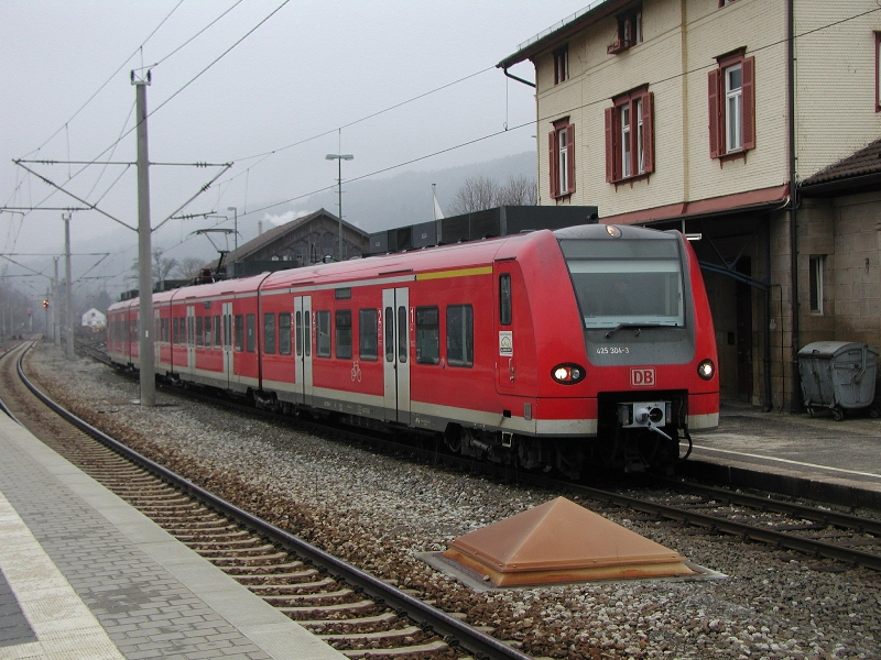 Regionalbahn 425 304-3 am 22.03.2006 im Bahnhof Murrhardt Fotografiert von FWF 12:57, 22. Mär 2006 (CET)